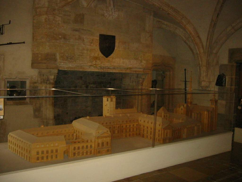 Maquette Palais Duc de Bourgogne dans la salle d'arme du musée du palais du Duc de Bourgogne de Dijon